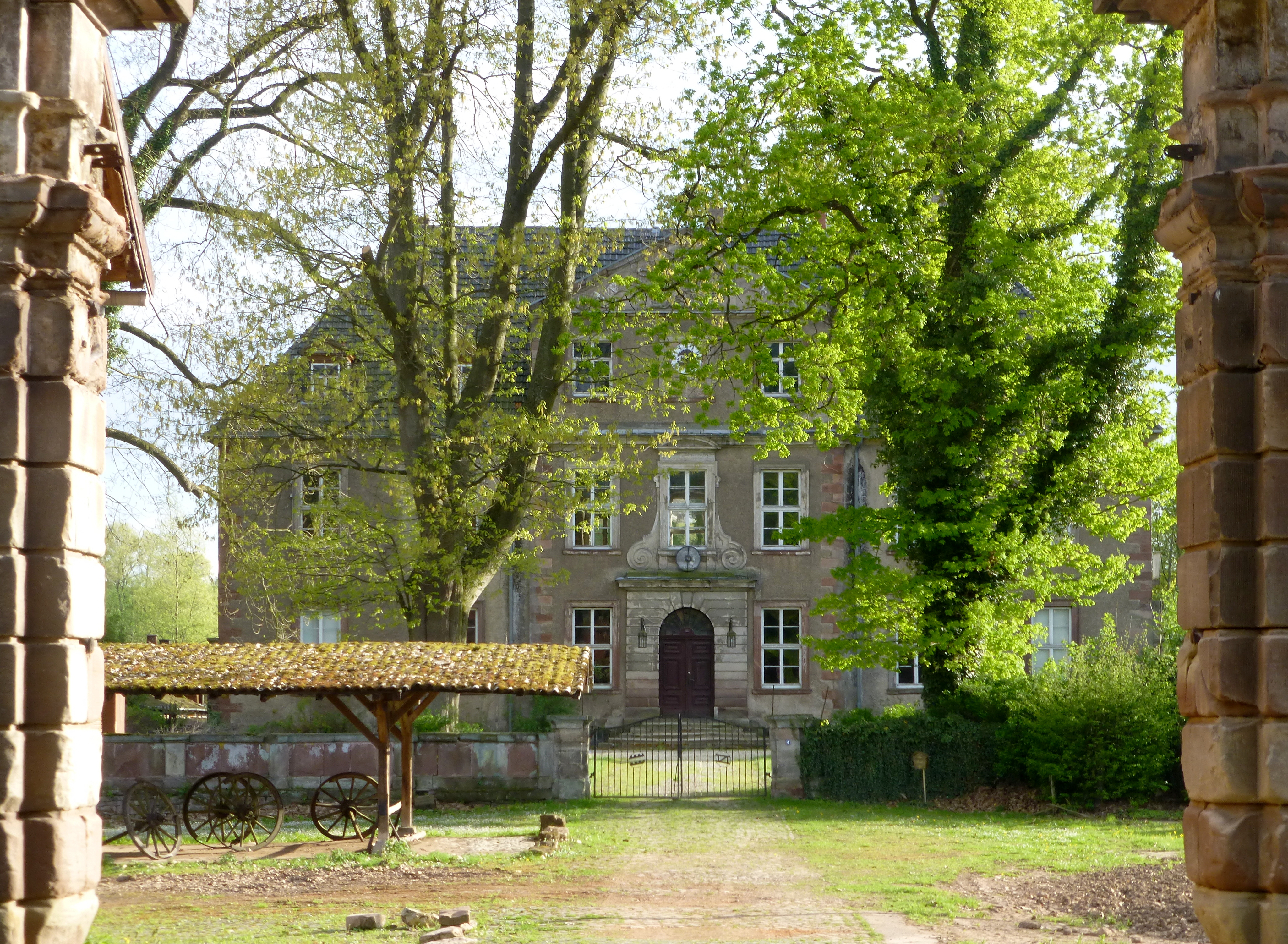 Gutshof in Rittmarshausen, Gemeinde Gleichen, Südniedersachsen, Vorderseite des Herrenhauses ("Schloss"). Barockes Herrenhaus erbaut 1708-16 durch Baumeister Sudfeld Vick aus Hannover unter Einbeziehung älterer Bauteile.